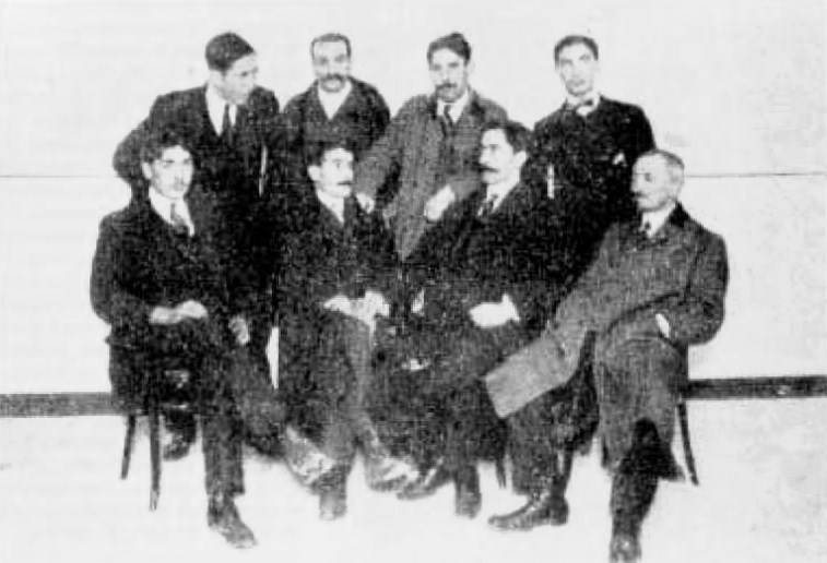 Junta organizadora del Partido Republicano Nacionalista Vasco (enero de 1911).